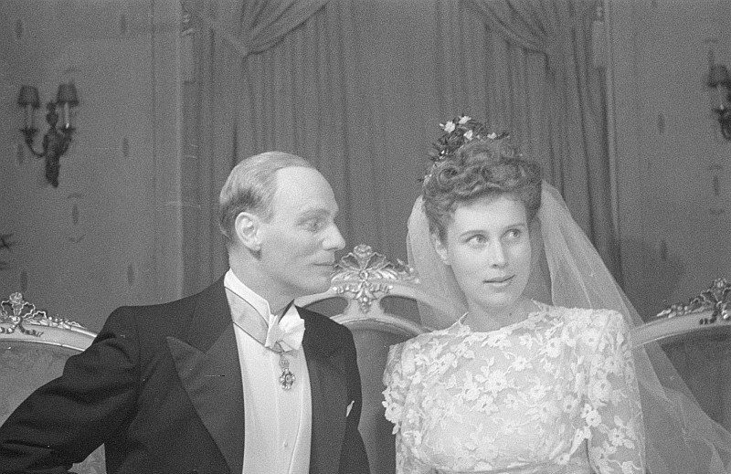 Original image description from the Deutsche FotothekSzenenbilder